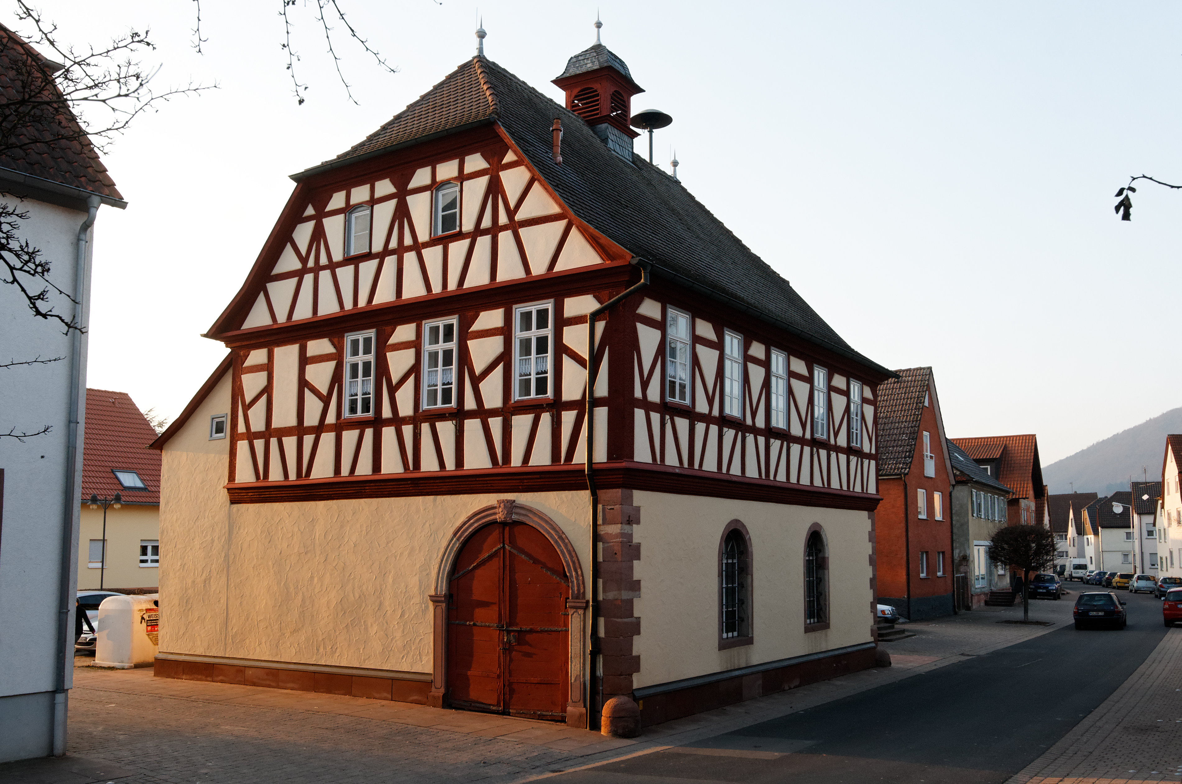 Ehemaliges Rathaus von Kleinheubach (Bayern)